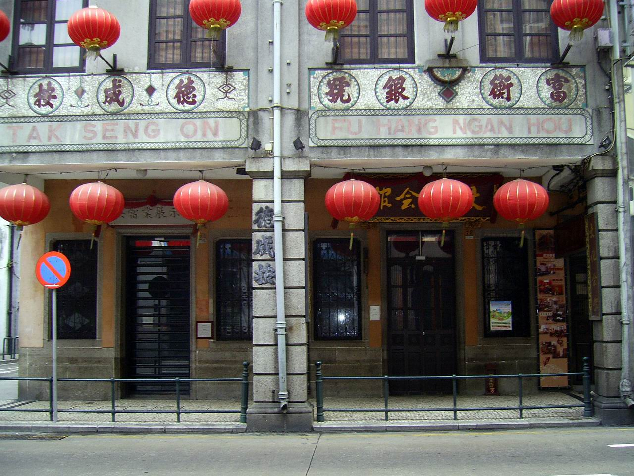 中文（香港）: 文化會館